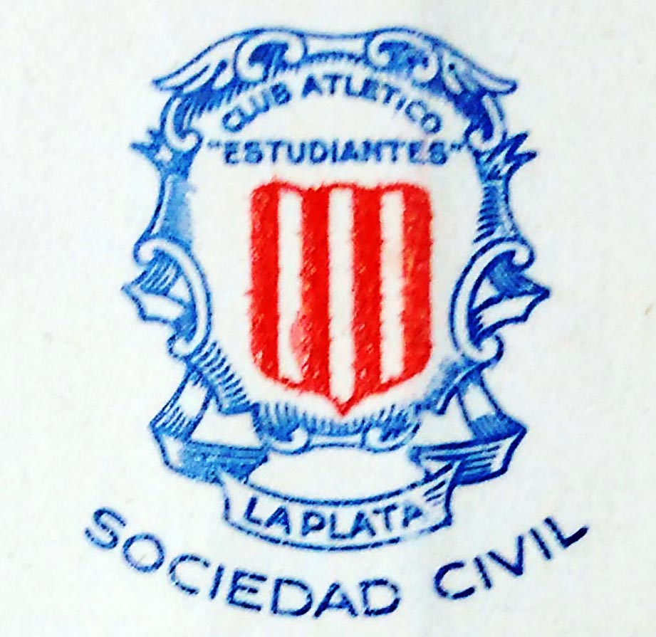 Imagen del escudo fundacional del Club Estudiantes de La Plata, con su primera denominación: "Club Atlético Estudiantes".